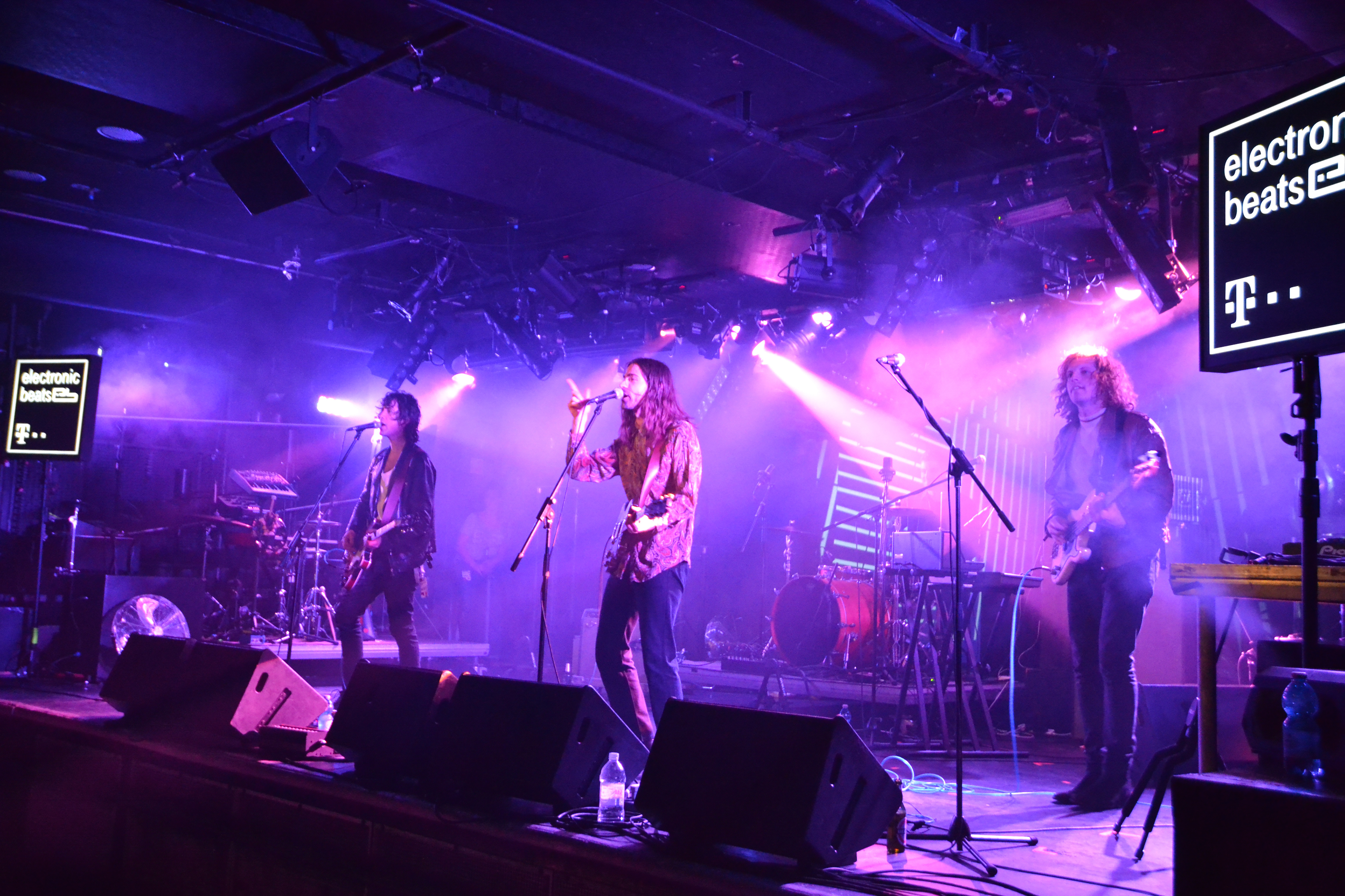 Ten Fé tijdens een optreden op Electronic Beats Festival Budapest 2015